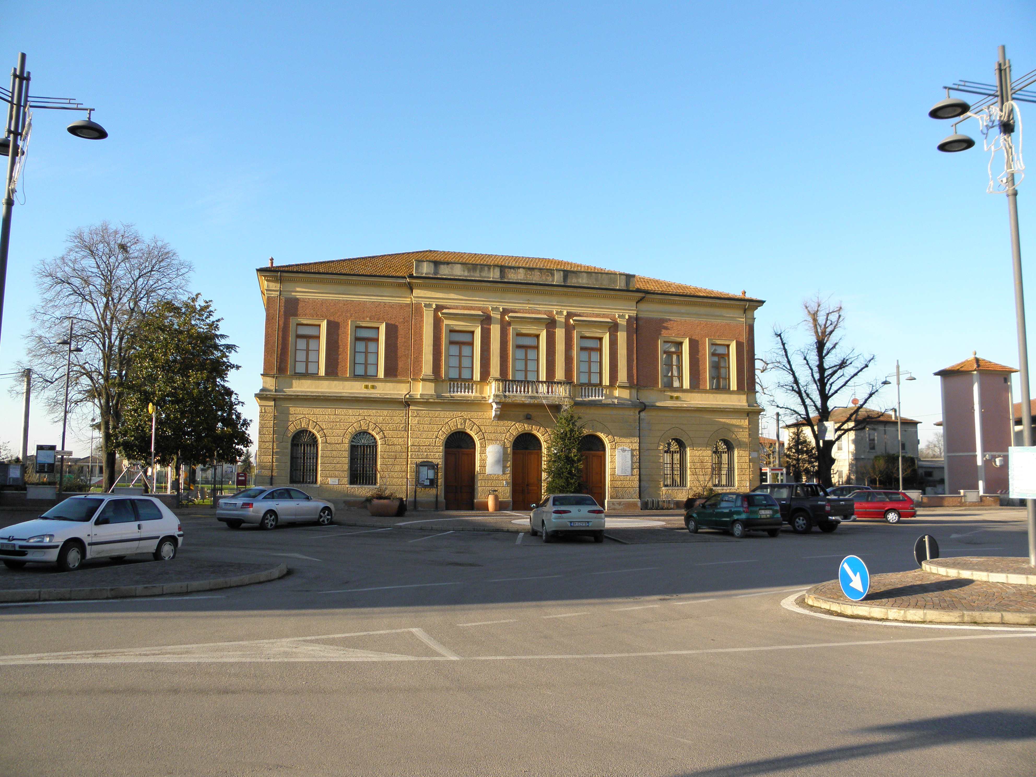 Calto, Palazzo Riminaldi, sede municipale del comune di Calto.